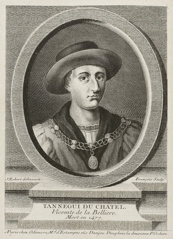 Portrait de Tanneguy IV du Chastel.